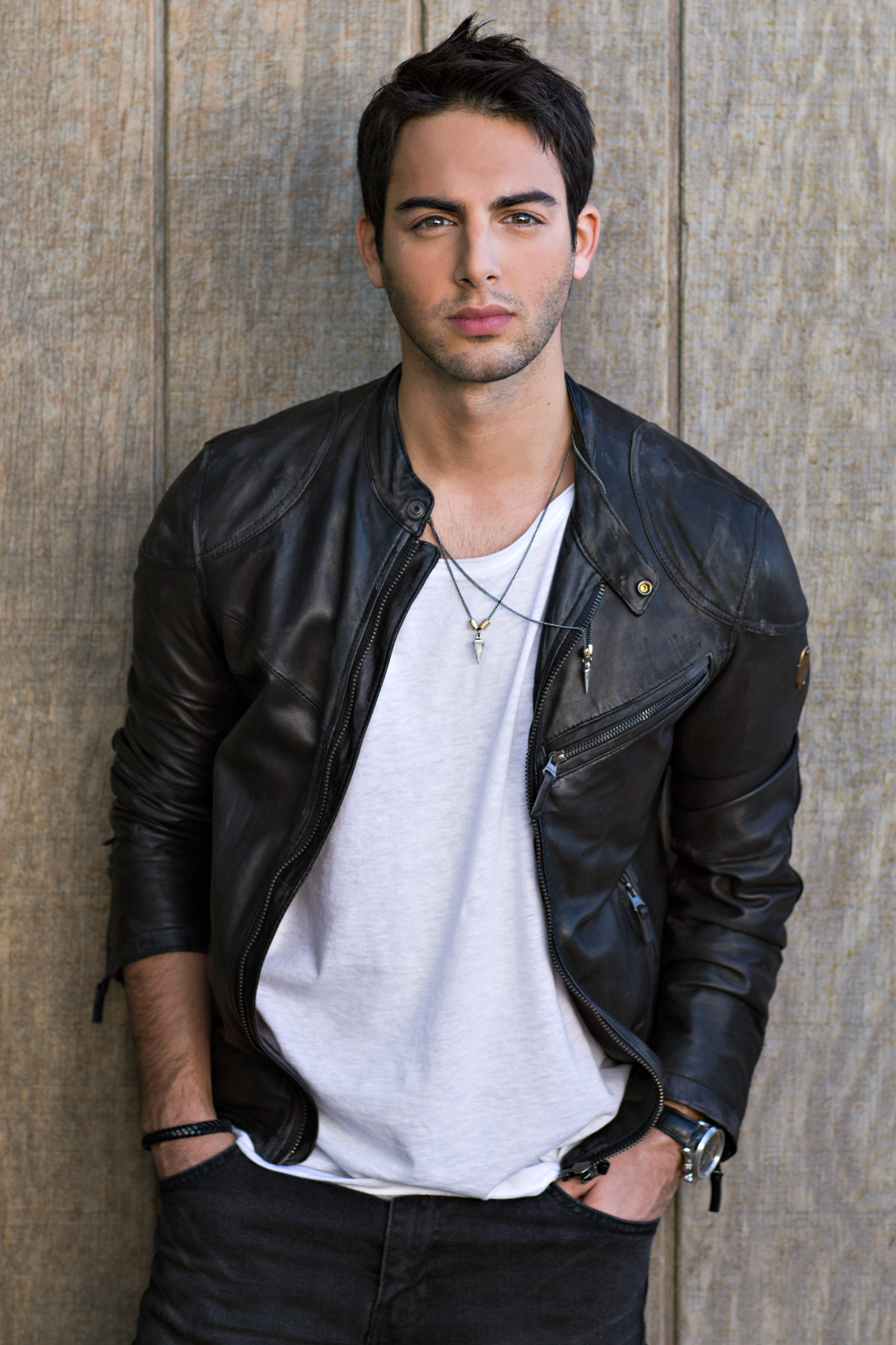 Artisten Darin.